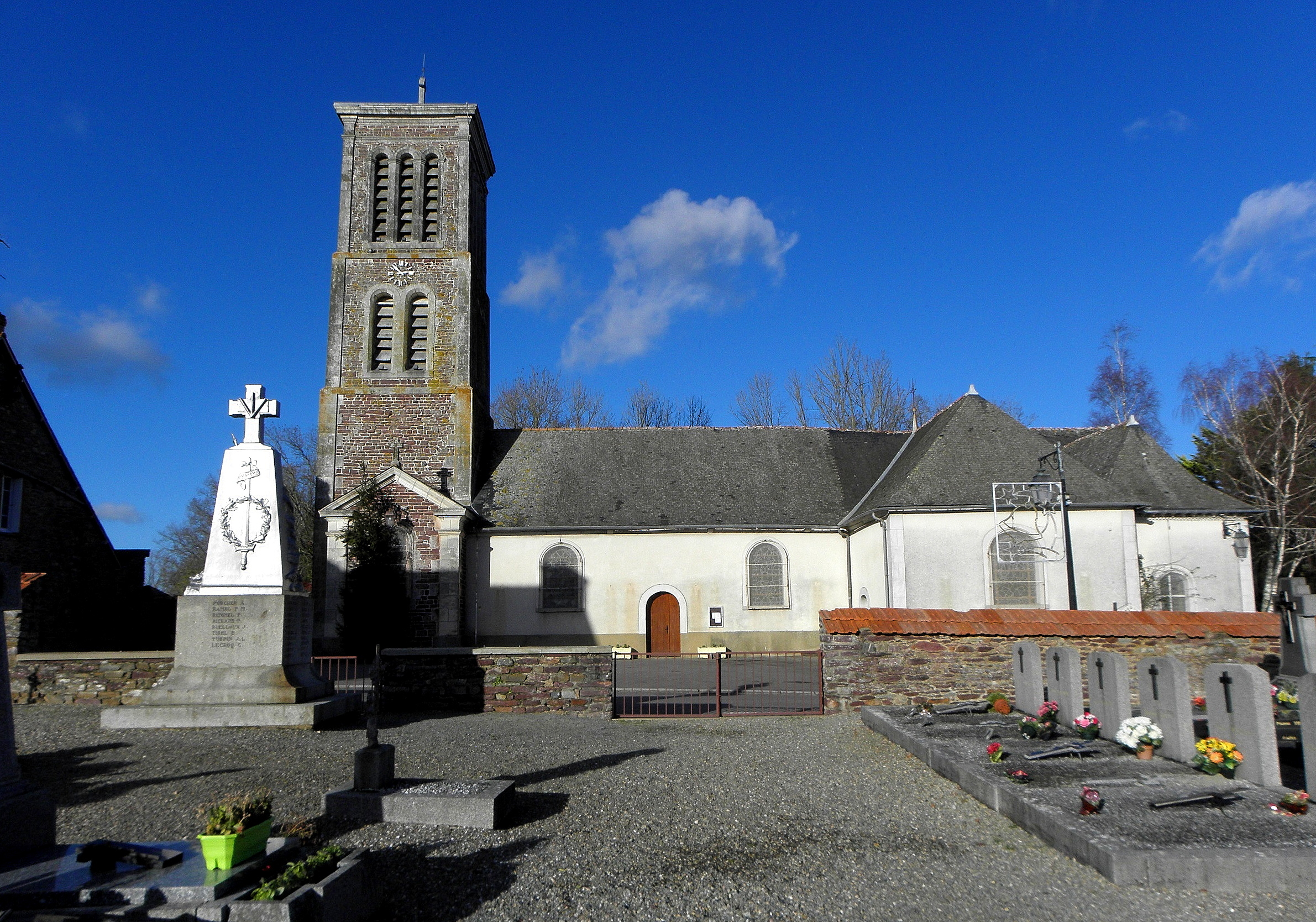 Cimetière, monument aux morts et église Saint-Thurial, commune de Saint-Thurial (35).